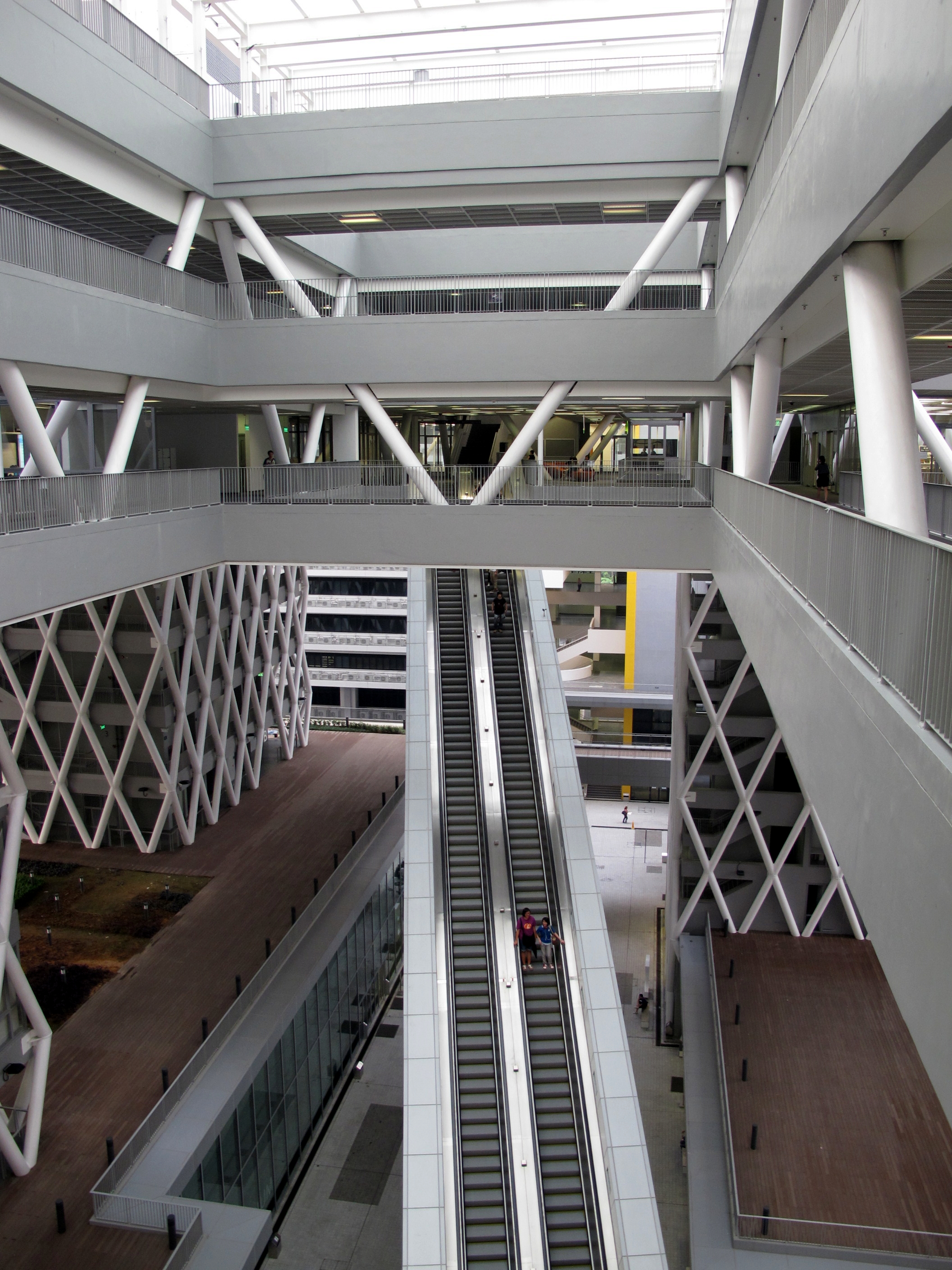 Hong Kong Design Institute Void 香港知專設計學院中庭